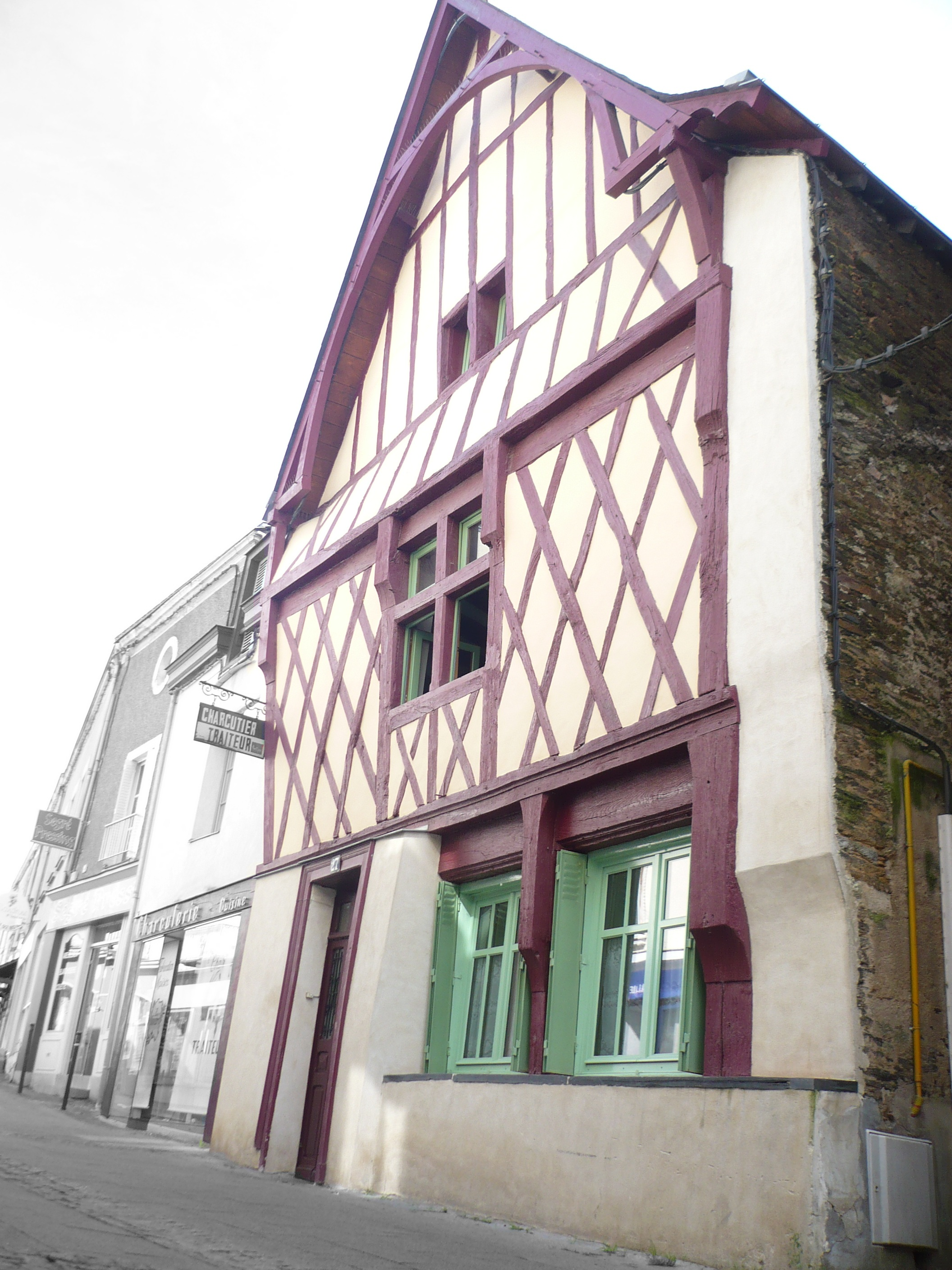 Maison 27 rue Pasteur, à Segré, Maine-et-Loire.